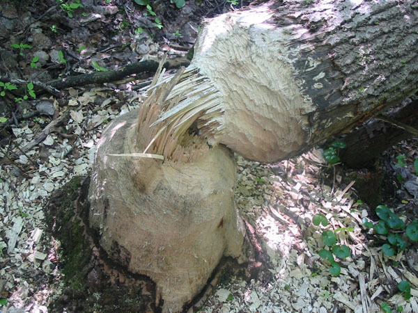 Koprapuu